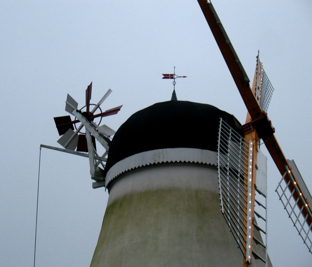 Ulbølle Mølle, Fåborgvej 127B, Ulbølle Eget foto, Noorse Licentie: CC-BY-SA-3.0 Forminsket versjon for Wikipedia